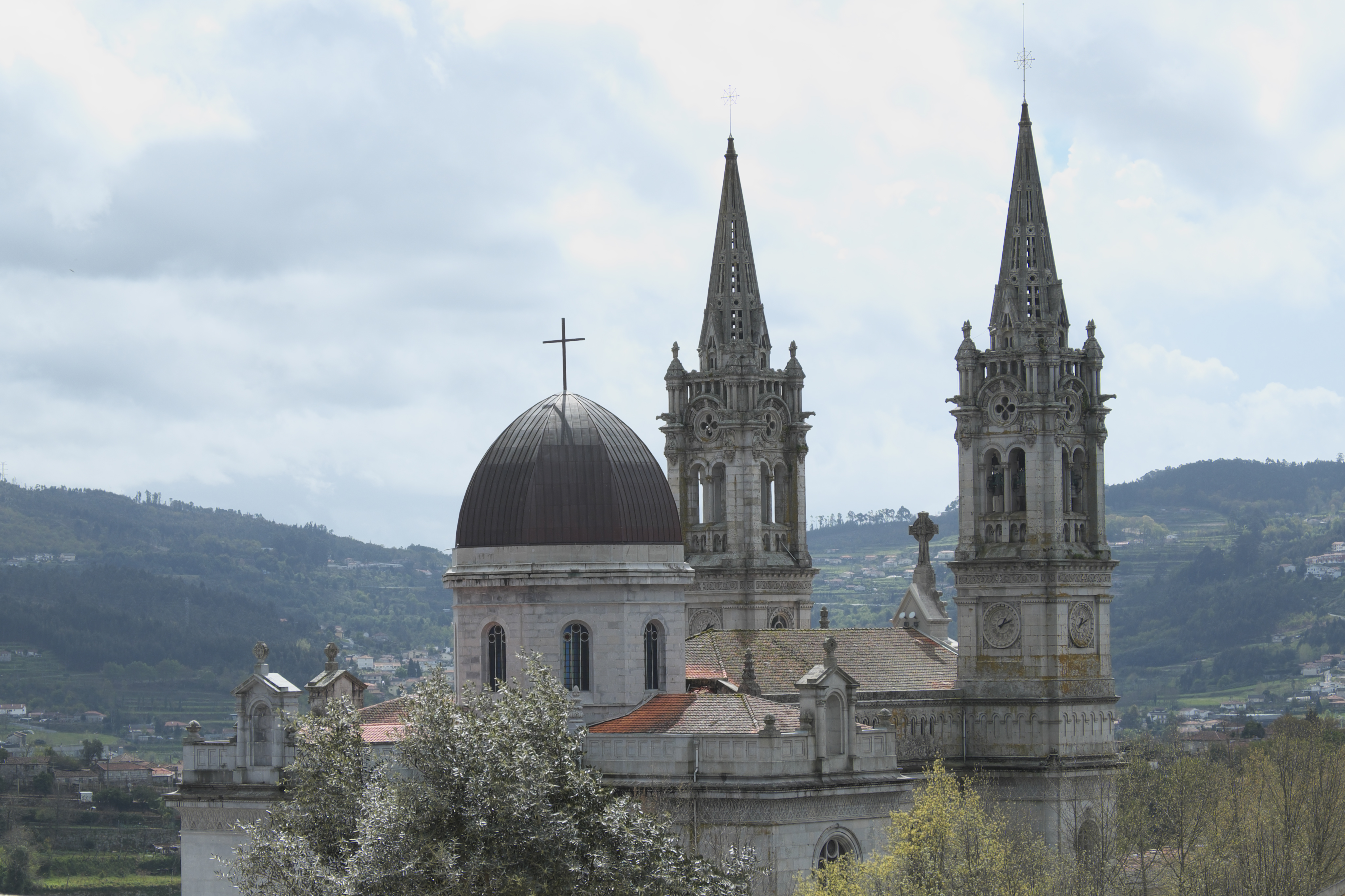 Kirche in São Torcato, einer Freguesia von Guimarães in der Região Norte (Portugal), Türme